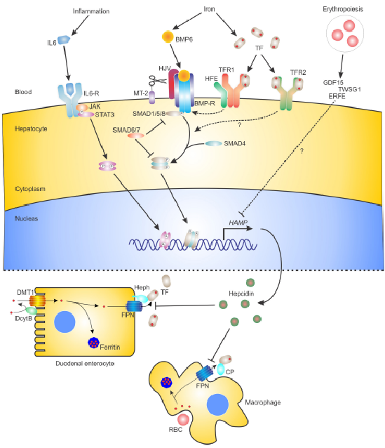 Схематическое изображение основных молекул и путей, участвующих в регуляции экспрессии гена гепсидина (HAMP) в гепатоцитах и функции гепсидина в регуляции поверхностной экспрессии белка экспорта железа ферропортина (FPN) в других типах клеток. Основные молекулы и пути, ответственные за железо, воспаление и эритропоэтическую регуляцию HAMP в гепатоцитах изображены вверху рисунка. Роль гепсидина из гепатоцитов в регуляции всасывания железа у энтероцитов двенадцатиперстной кишки и рециклинг железа в макрофагах через его взаимодействие с FPN изображены в нижней части рисунка. Маленькие красные круги обозначают железо. IL-6, интерлейкин 6; IL-6-R, рецептор IL-6; JAK, Янус киназа; STAT3, преобразователь сигнала и активатор транскрипции 3; BMP6, костный морфогенетический белок 6; BMP-R, рецептор BMP; HJV, гемоювелин; МТ-2, матриптаза-2; HFE, белок гемохроматоза; ТФ, трансферрин; TFR1, рецептор TF 1; TFR2, рецептор TF 2; GDF15, фактор дифференциации роста 15; TWSG1, скрученная гаструляция; ERFE, эритроферрон; DMT1, двухвалентный металлический транспортер 1; DcytB, дуоденальный цитохром B.